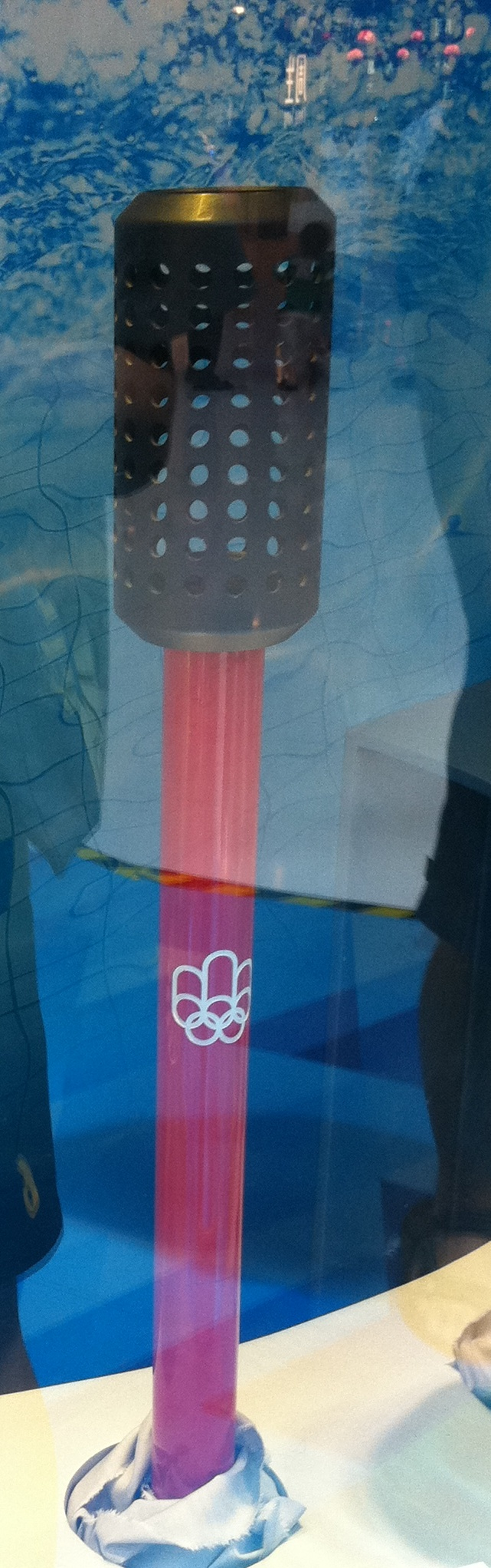 1976年夏季奧運火炬